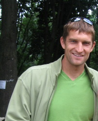 Белорусский теннисист Максим Мирный